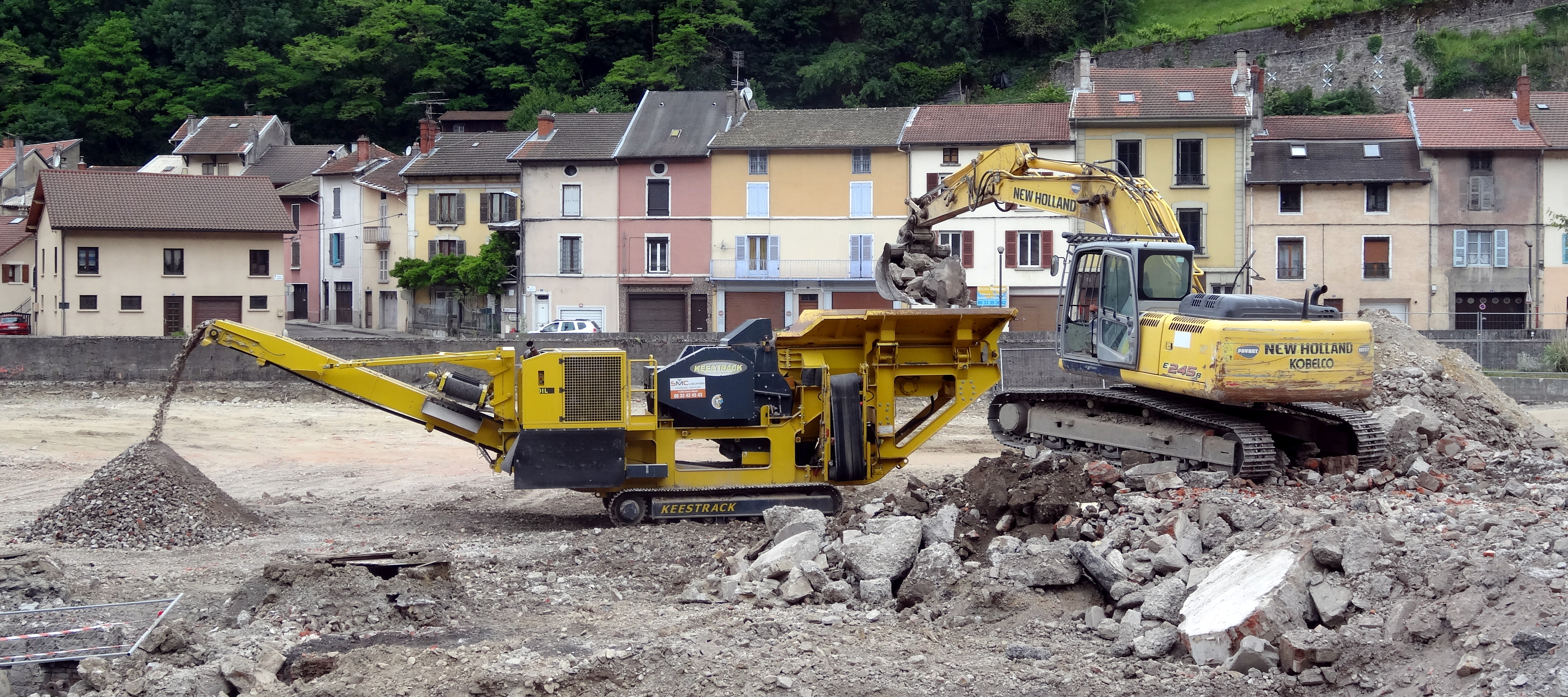 Concasseur Keestrack en action